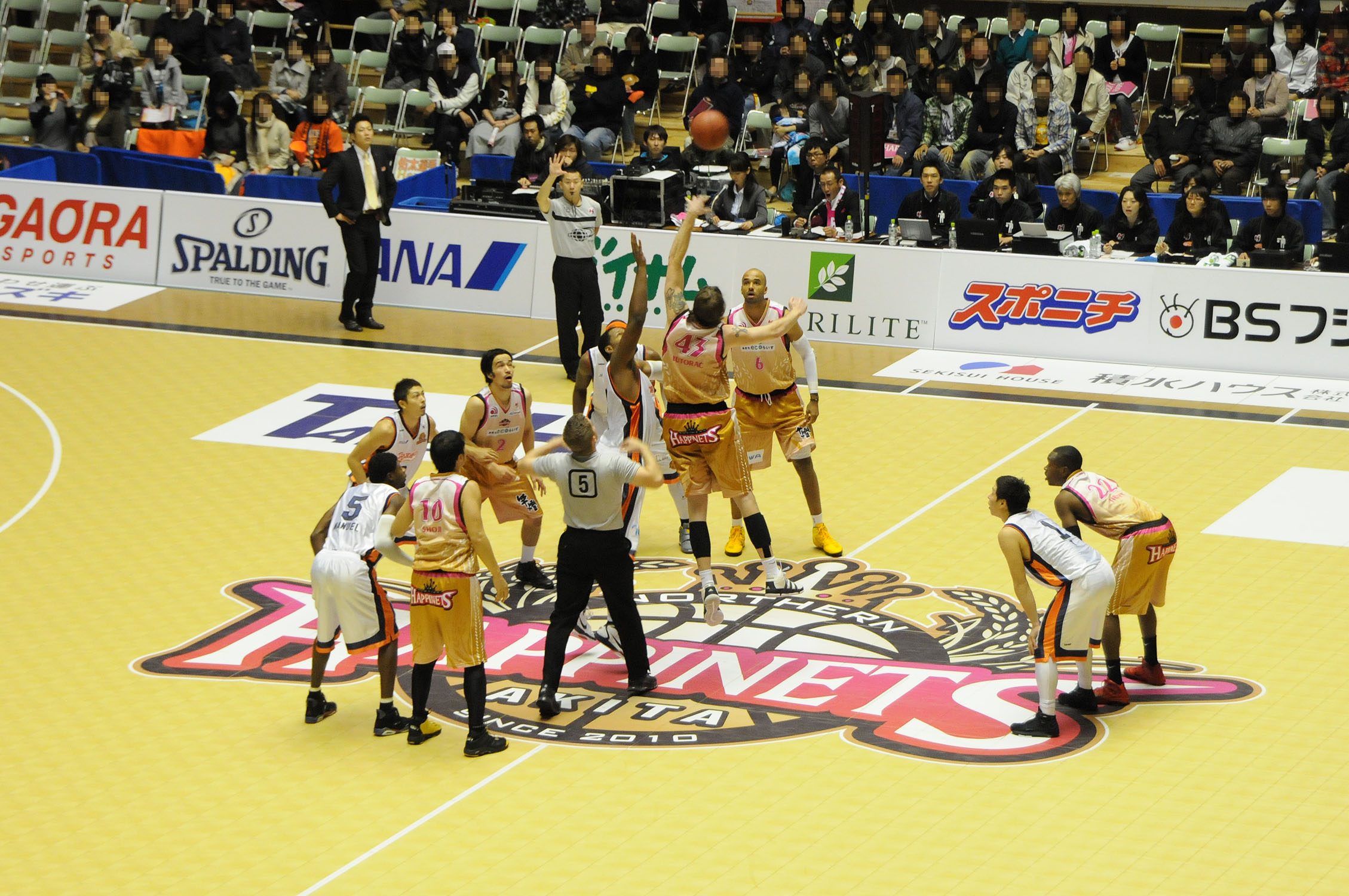 bjリーグ2010-11、秋田ノーザンハピネッツ対宮崎シャイニングサンズ、秋田県立体育館